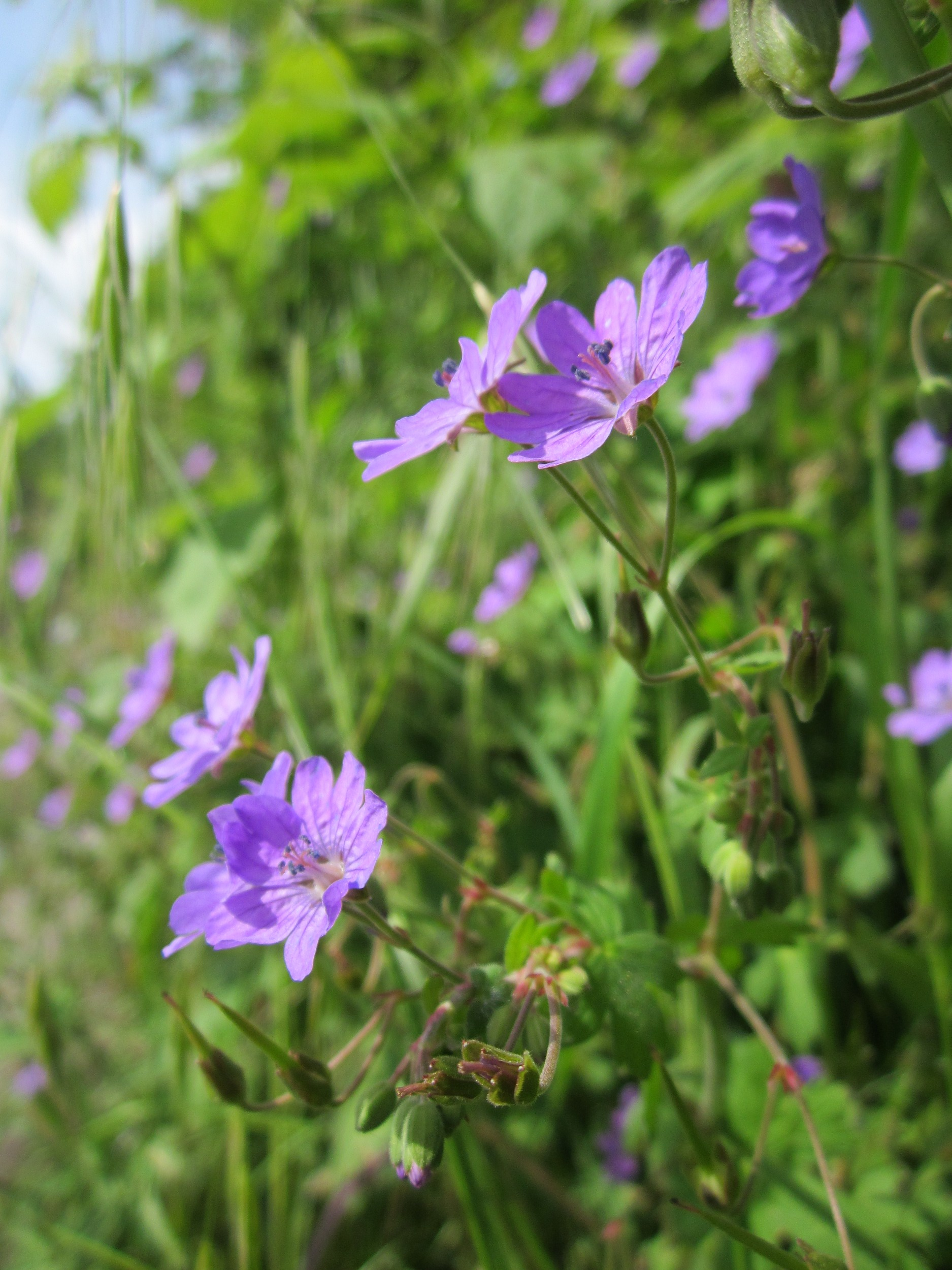 Pyrenäen-Storchschnabel (Geranium pyrenaicum) bei Altlußheim